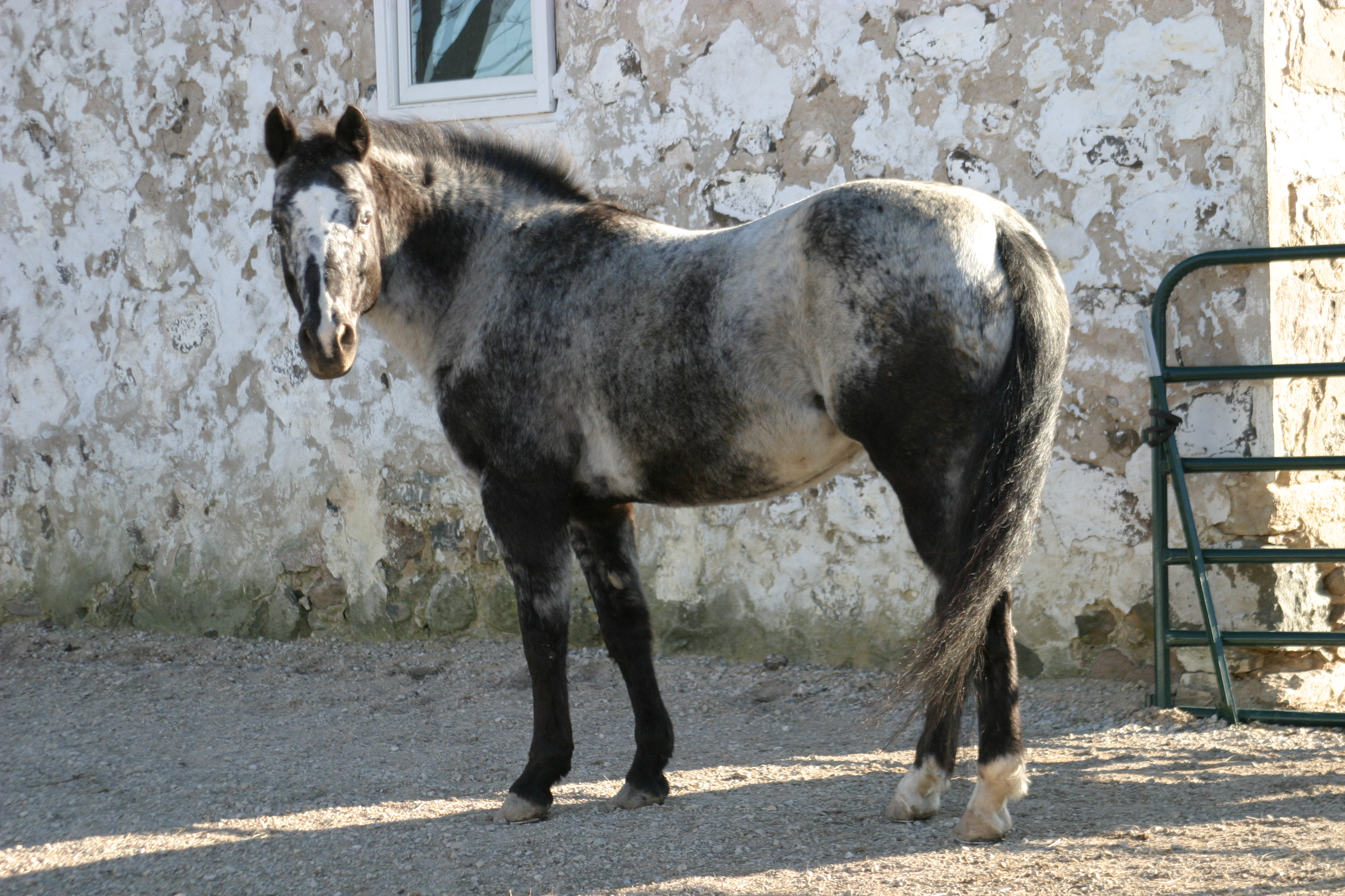 ½ Appaloosa / QH cross mare